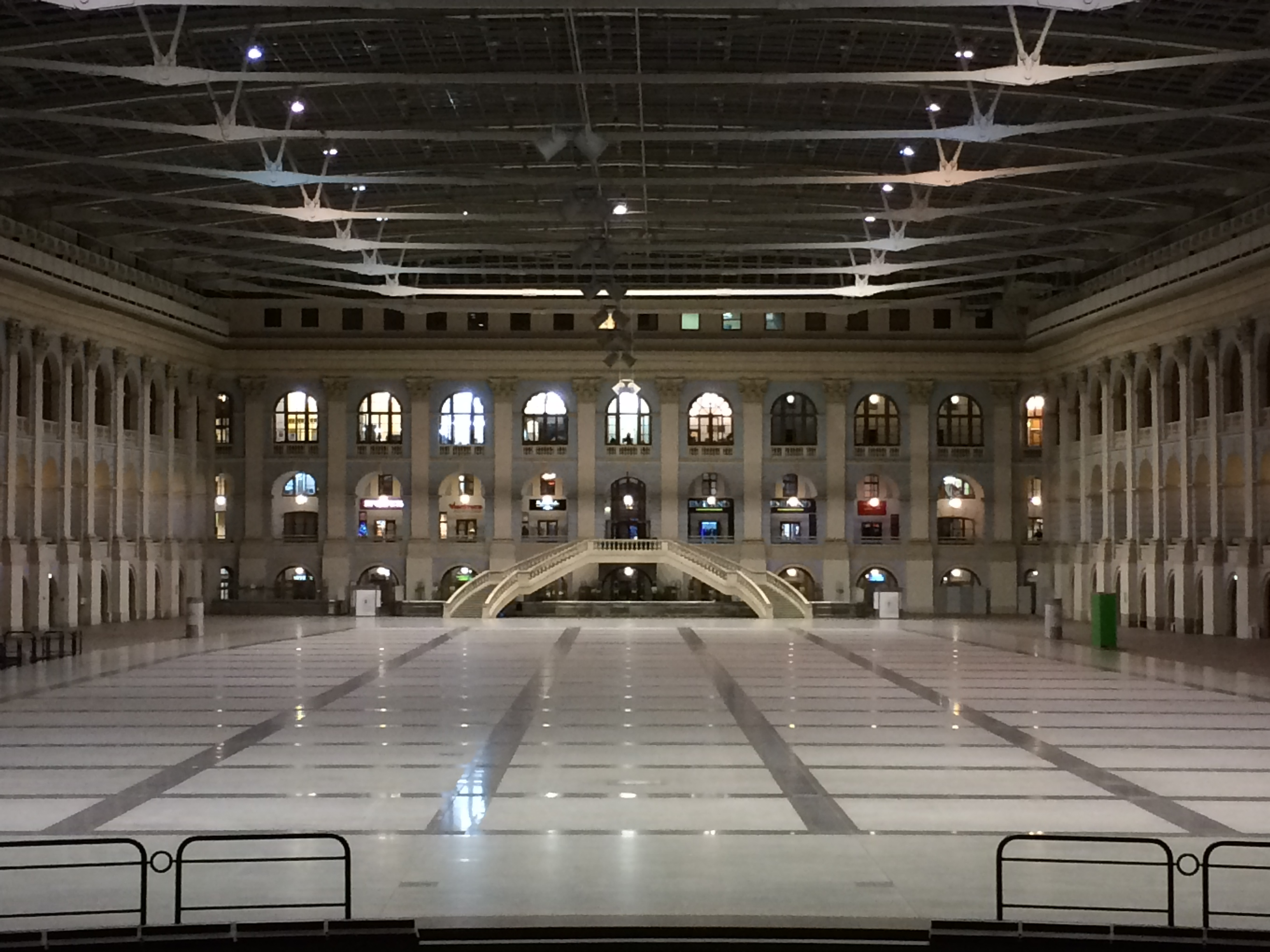 Старый Гостиный двор: Ильинка ул., дом 4, Тверской, Центральный округ, Москва